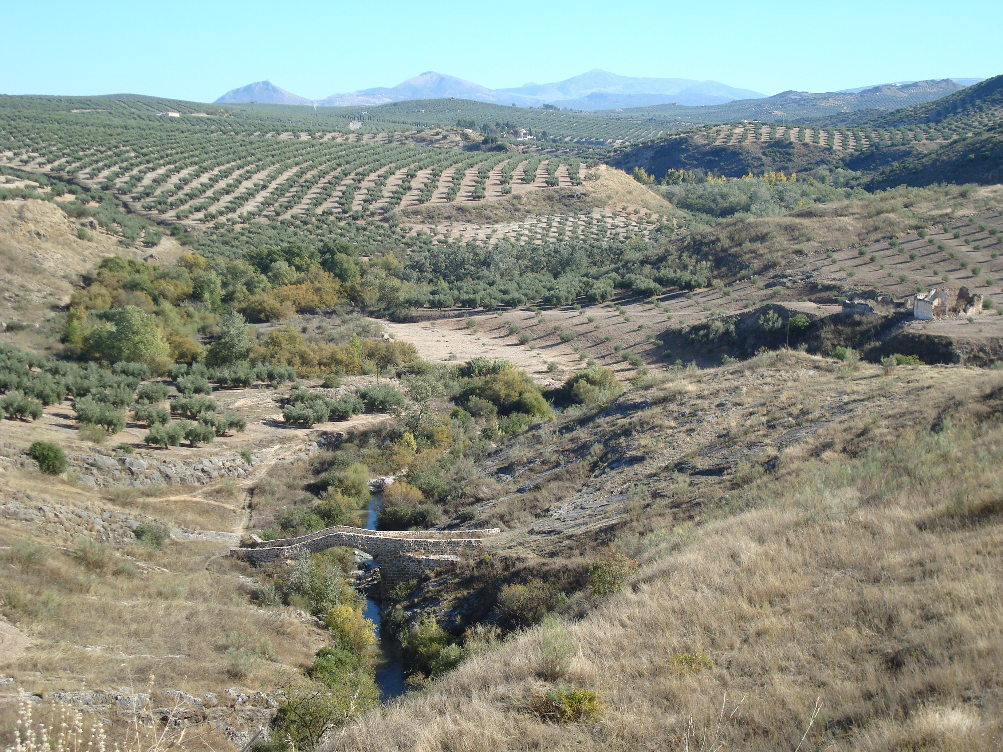 Vía Verde del Aceite